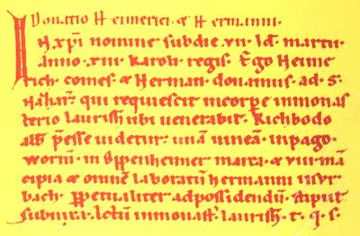 Urkunde aus dem Lorscher Kodex